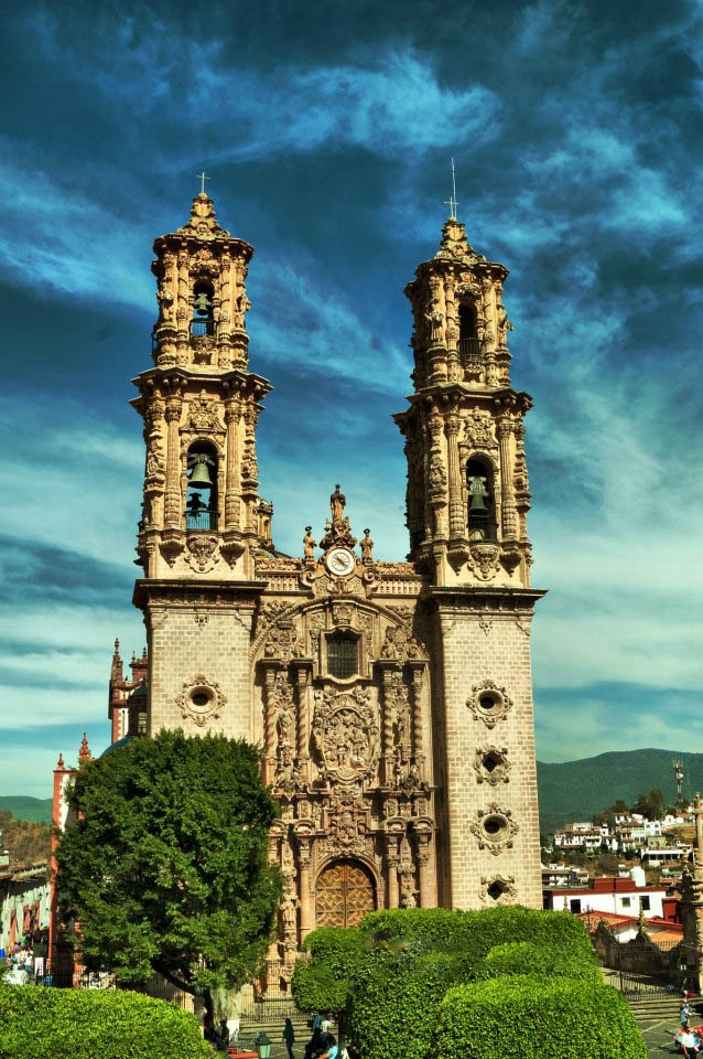 Templo de Santa Prisca de Taxco